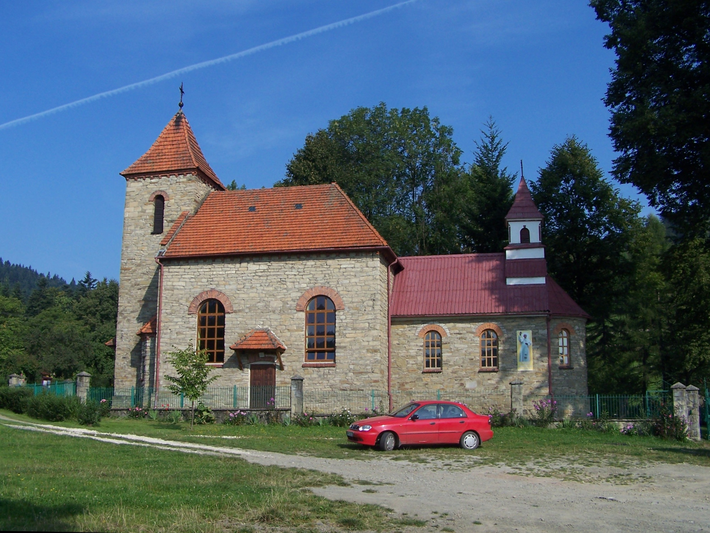 Węglówka (województwo małopolskie). Kościół Matki Boskiej Anielskiej